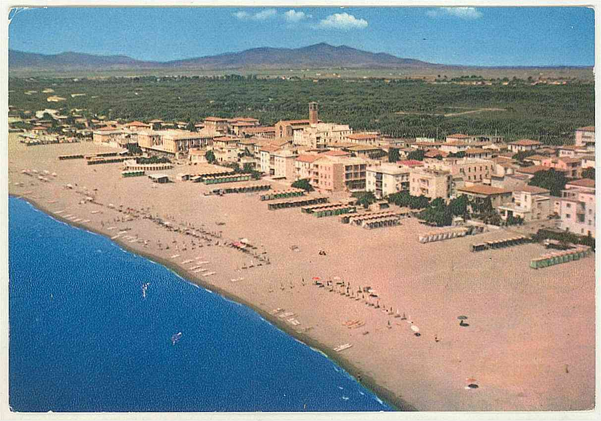 GR Marina di Grosseto - panorama aereo